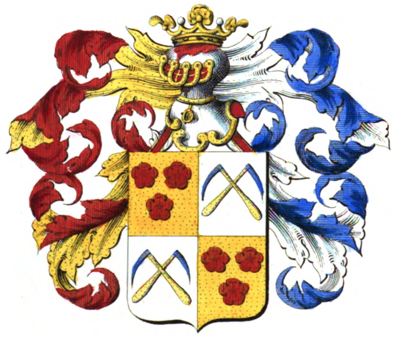 Armoiries de la famille Coune